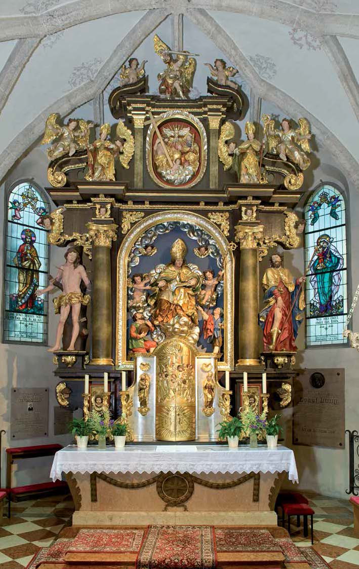 Altar Pfarrkirche Mehrbach